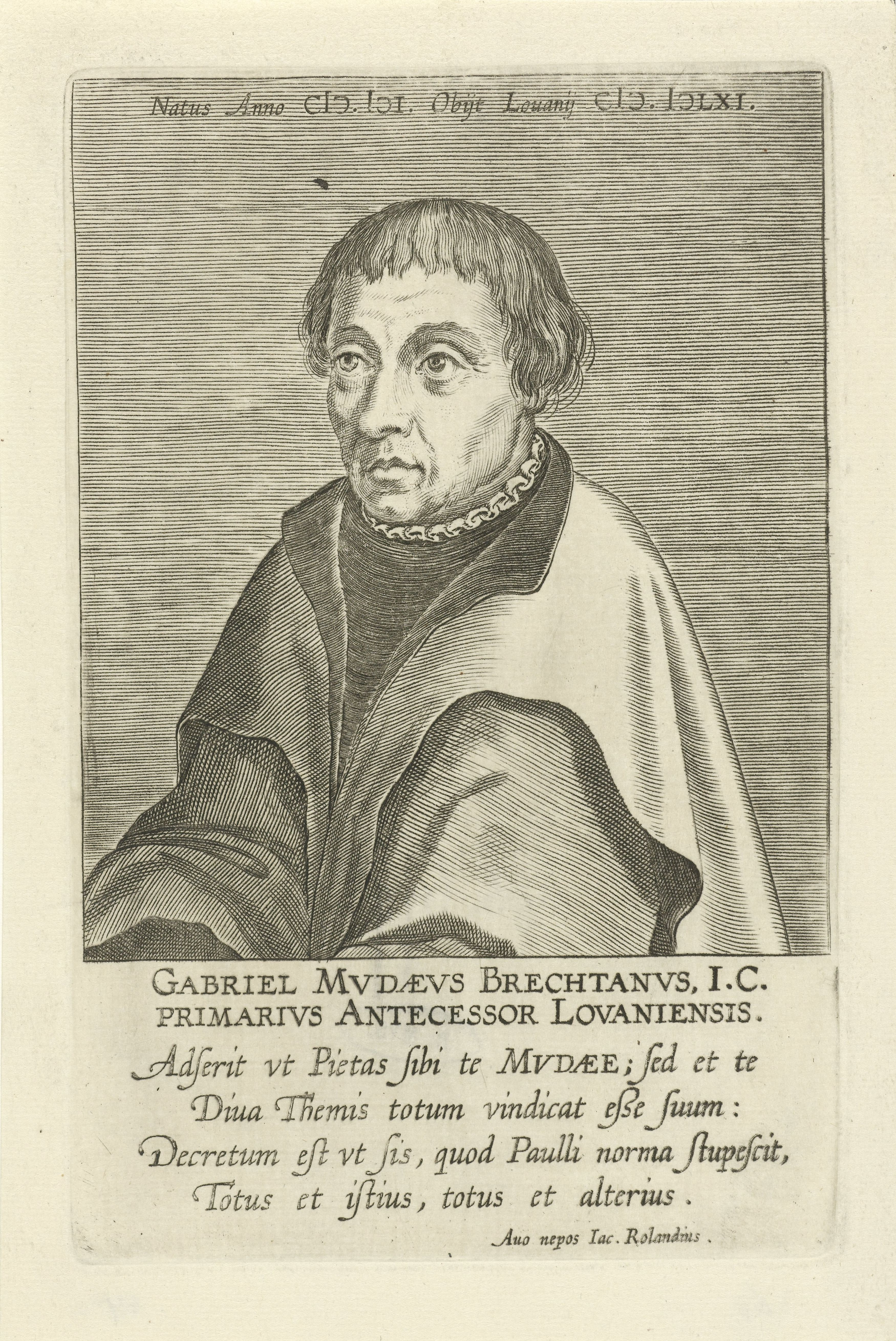 IdentificatieTitel(s): Portret van Gabriel van der MuydenGabriel Mvdaevs Brechtanvs I.C. (titel op object)Bekende schrijvers uit de Nederlanden (serietitel)Bibliotheca Belgica (serietitel)Objecttype: prent boekillustratie Objectnummer: RP-P-1906-679Catalogusreferentie: New Hollstein Dutch fig. 34-2(2)Opschriften / Merken: verzamelaarsmerk, verso midden onder, gestempeld: Lugt 2228Omschrijving: Portret van Gabriel van der Muyden, professor Romeins Recht te Leuven. De prent heeft een Latijns boven- en onderschrift en maakt deel uit van een serie van beroemde Nederlandse en Vlaamse geleerden.VervaardigingVervaardiger: prentmaker: Philips Galle (toegeschreven aan atelier van)schrijver: Jacobus Rolandus (vermeld op object)uitgever: Franciscus FoppensPlaats vervaardiging: prentmaker: Antwerpenschrijver: Antwerpenuitgever: BrusselDatering: 1608 en/of 1739Fysieke kenmerken: gravureMateriaal: papier Techniek: graveren (drukprocedé)Afmetingen: plaatrand: h 162 mm × b 105 mmToelichtingBoekillustratie uit Johannes Franciscus Foppers, 'Bibliotheca Belgica', Brussel 1739.OnderwerpWie: Gabriel van der MuydenVerwerving en rechtenVerwerving: aankoop 1906Copyright: Publiek domein